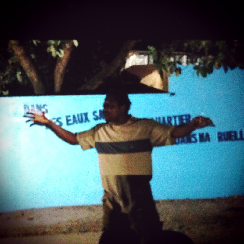 SUD Salon Urbain de Douala 2010